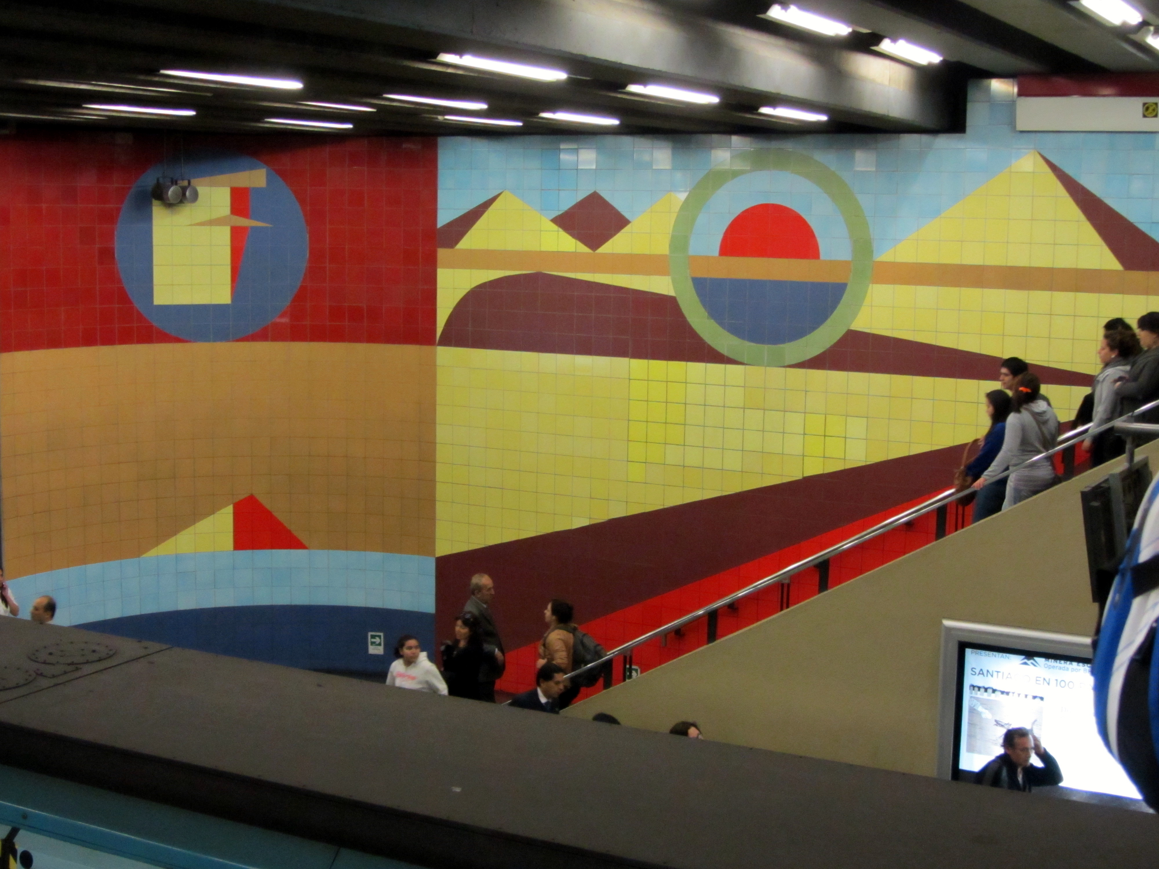 Fragmento del gran mural titulado Geometría andina (1993, mosaicos de cerámica policromada, 170 m²), obra del pintor Ramón Vergara Grez en la estación Los Leones, Santiago de Chile